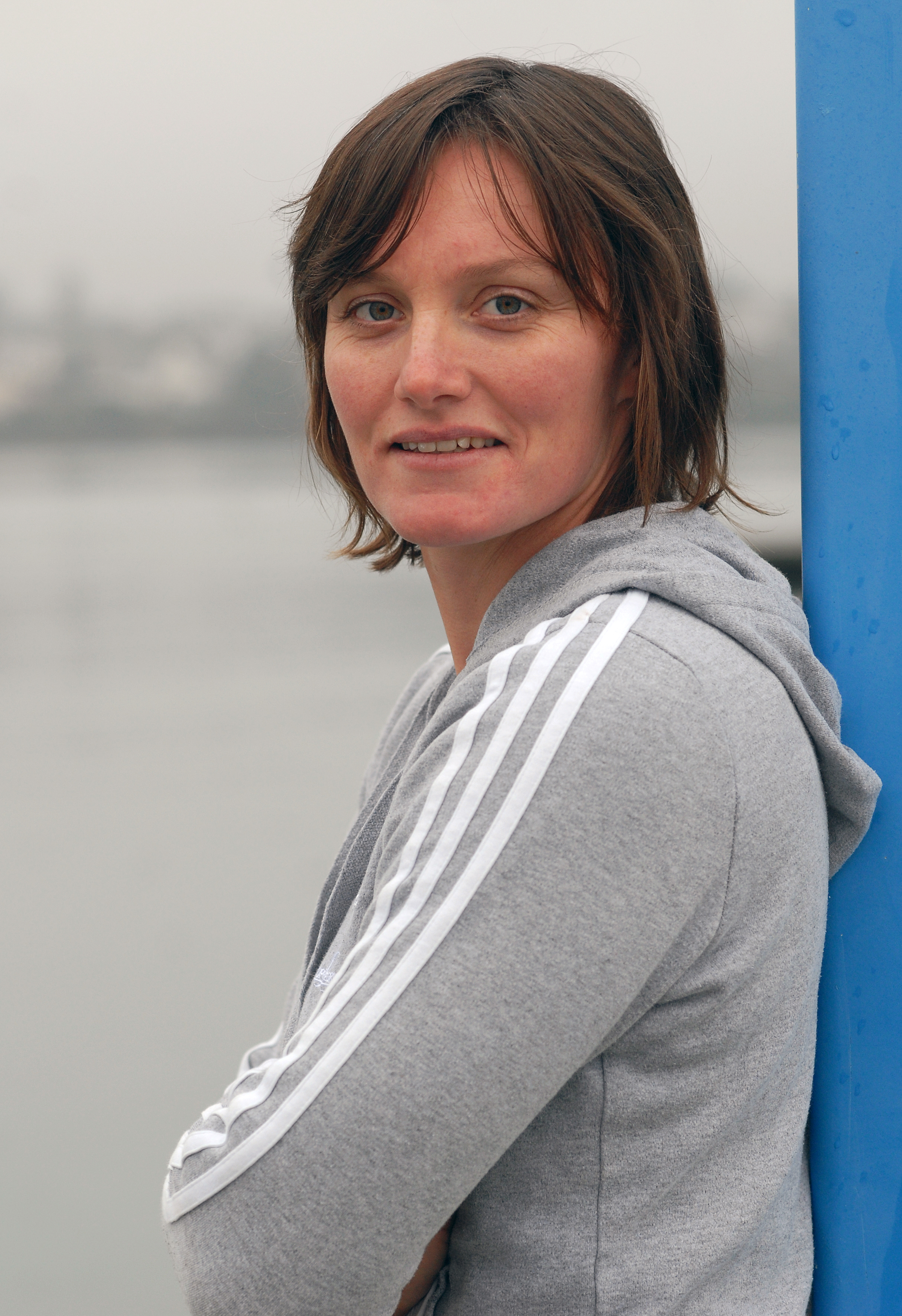 Portrait de Marie Riou à Brest